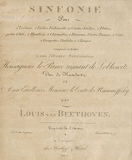 Deckblatt der Ausgabe 1329 von Beethovens Fünfter Erstellt von Boris Fernbacher 20:05, 14. Jun 2005 (CEST)